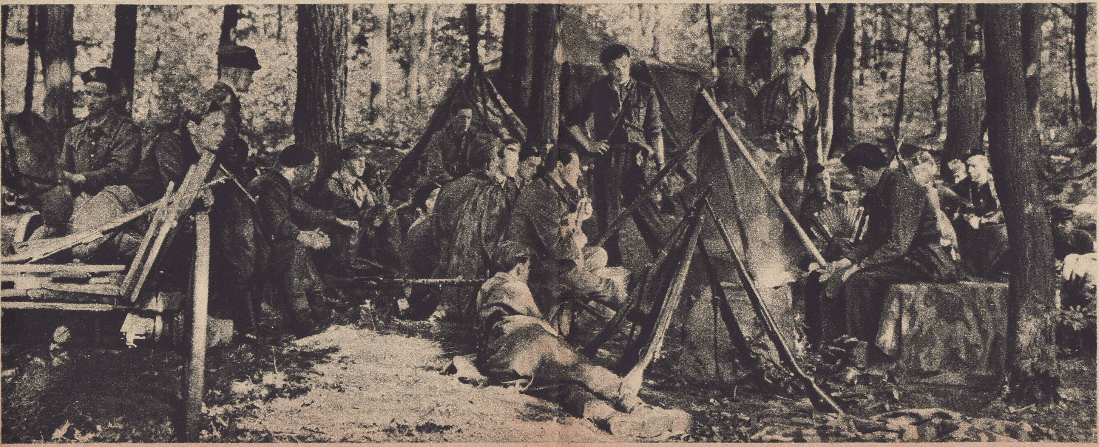 Kadr z filmu fabularnego Zakazane Piosenki nakręconego w 1946 roku w zburzonej Warszawie.